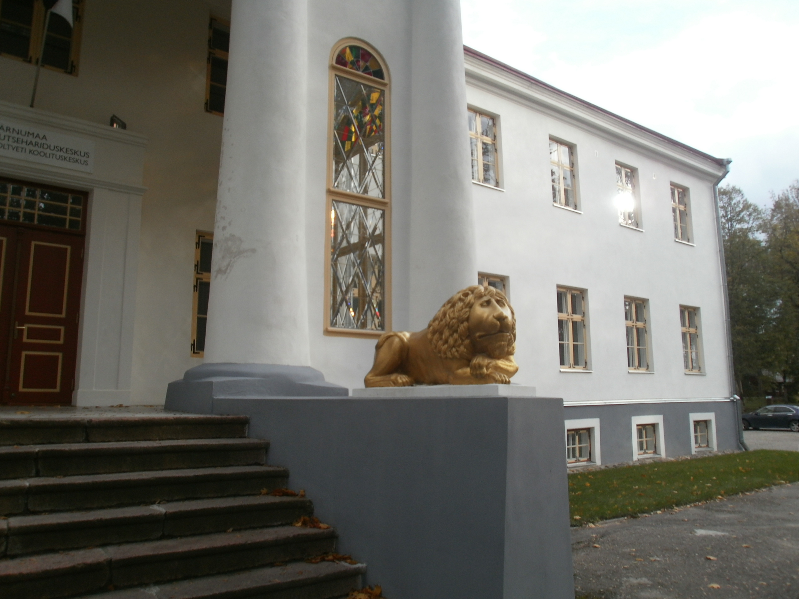 Von Stryckkide armastatud disainielement - kuldne lõvi.